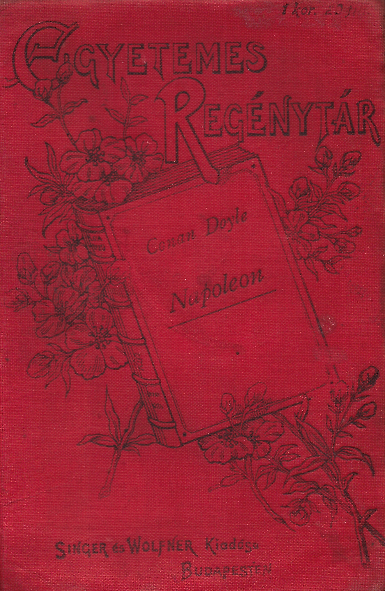 Arthur Conan Doyle (1859-1930): Napóleon. Egy francia nemes följegyzései (Singer-Wolfner, Budapest, 1911, Egyetemes regénytár-sorozat)